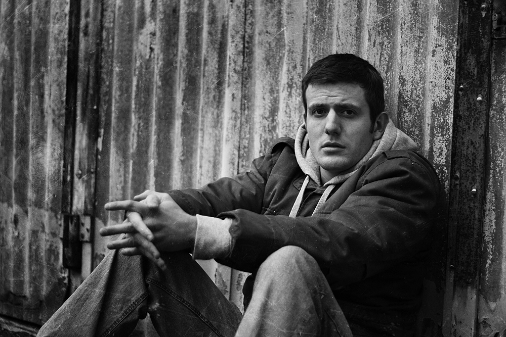 Rapper JAW im Jahr 2010